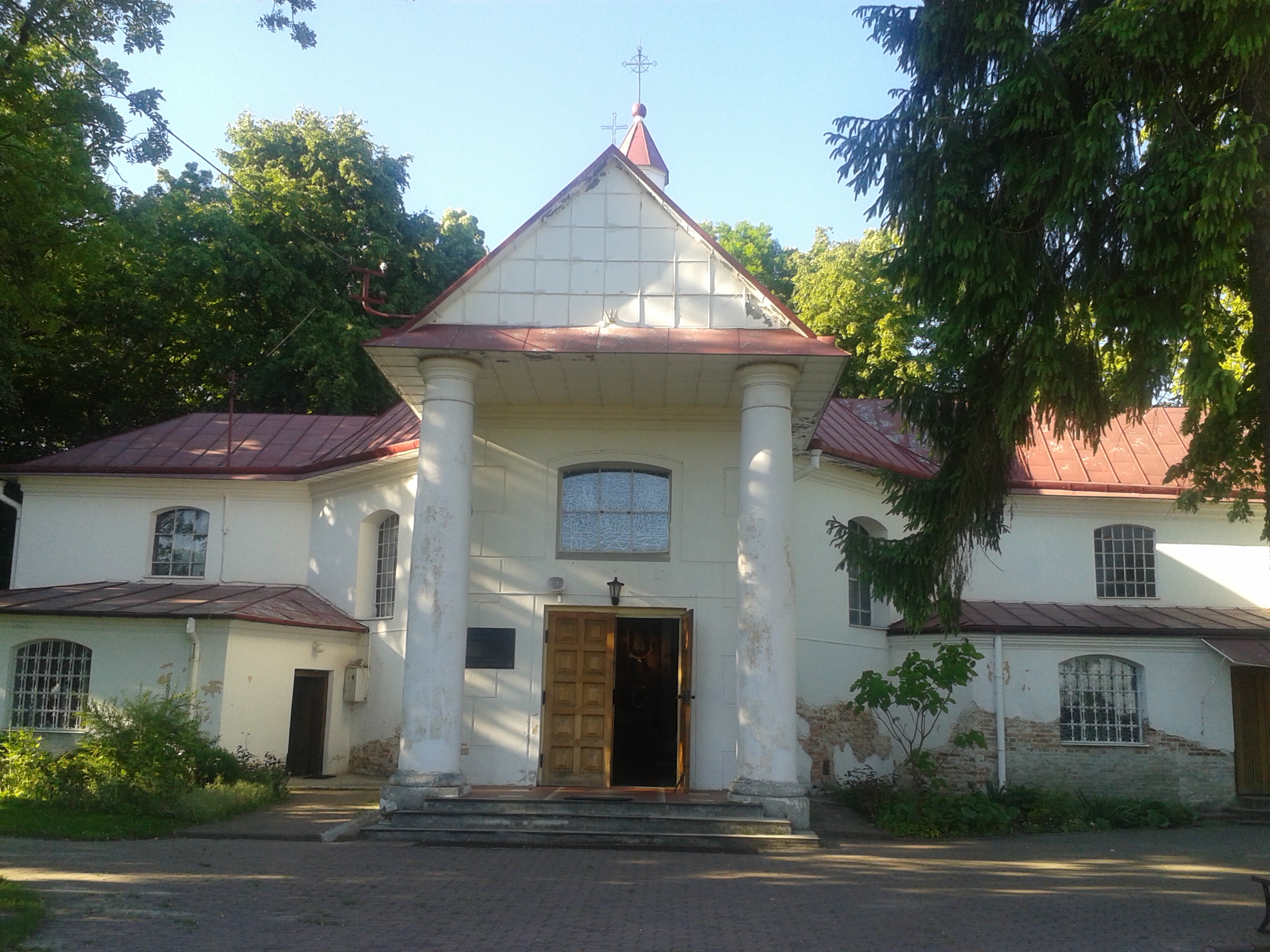 Wejście do kościoła w Starym Brusie, dawnej kaplicy dworskiej, a następnie cerkwi